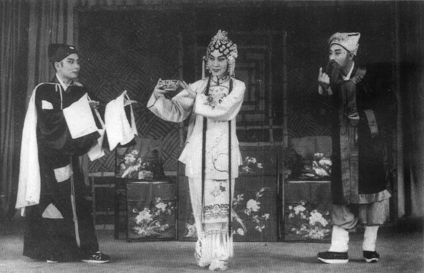 1960年錫劇金玉奴劇照